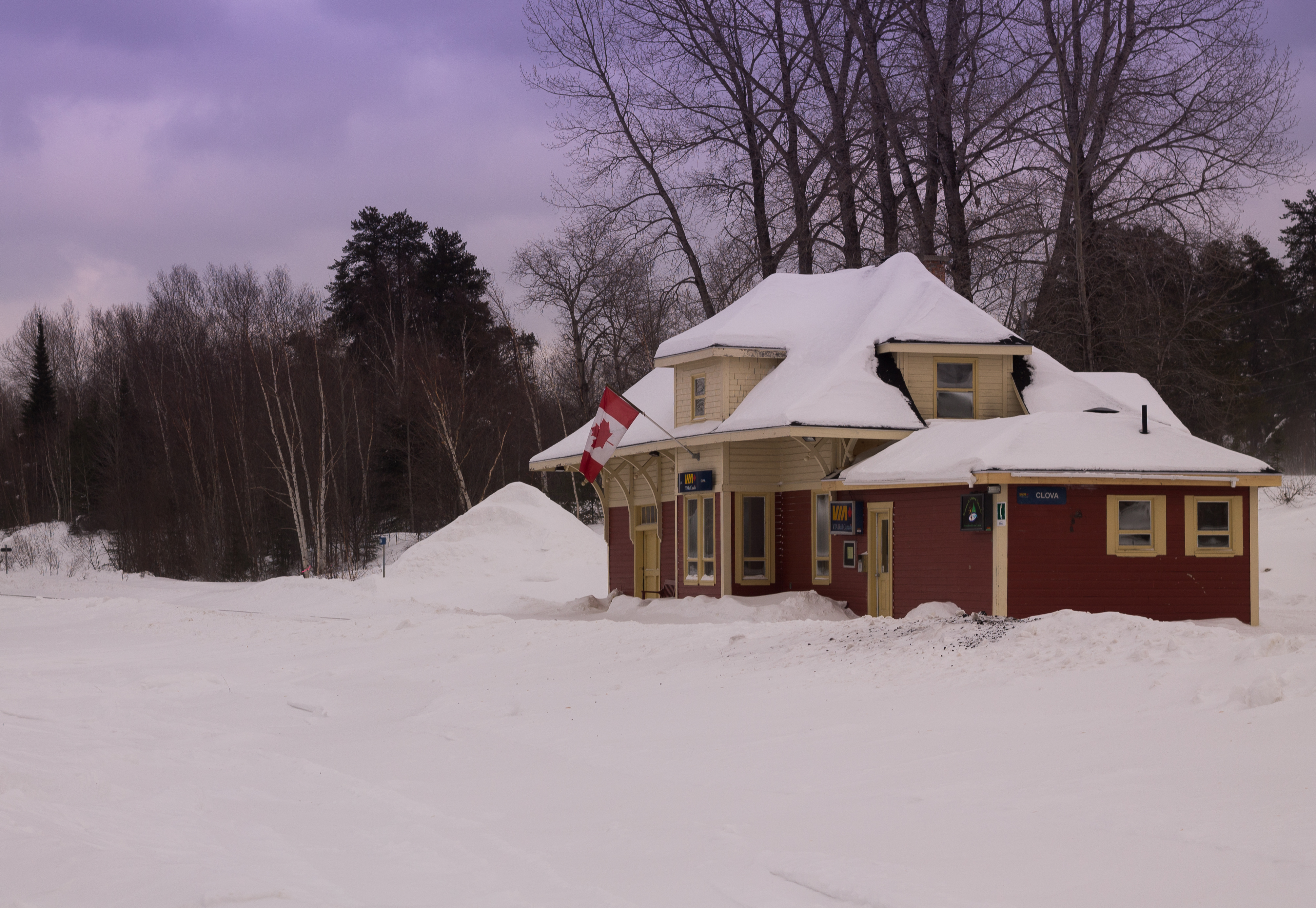 Gare de Clova, Janvier 2015. (Haute-Mauricie, Québec)